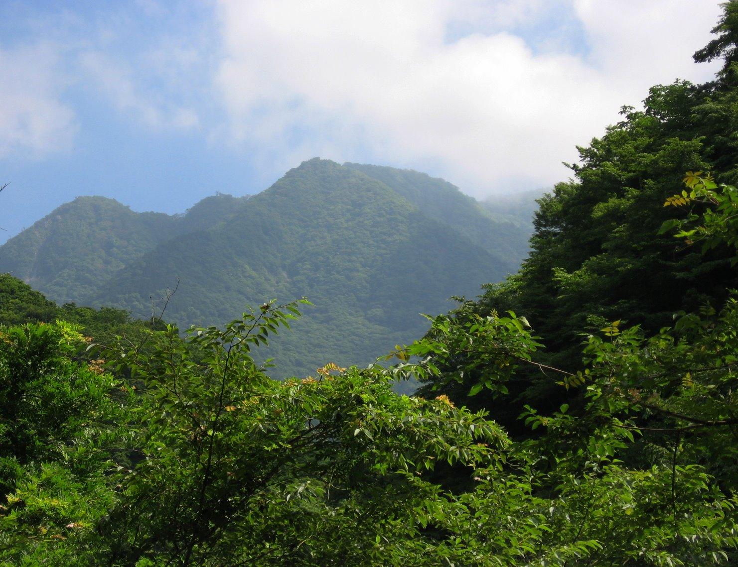 仲ノ沢林道より望む石棚山